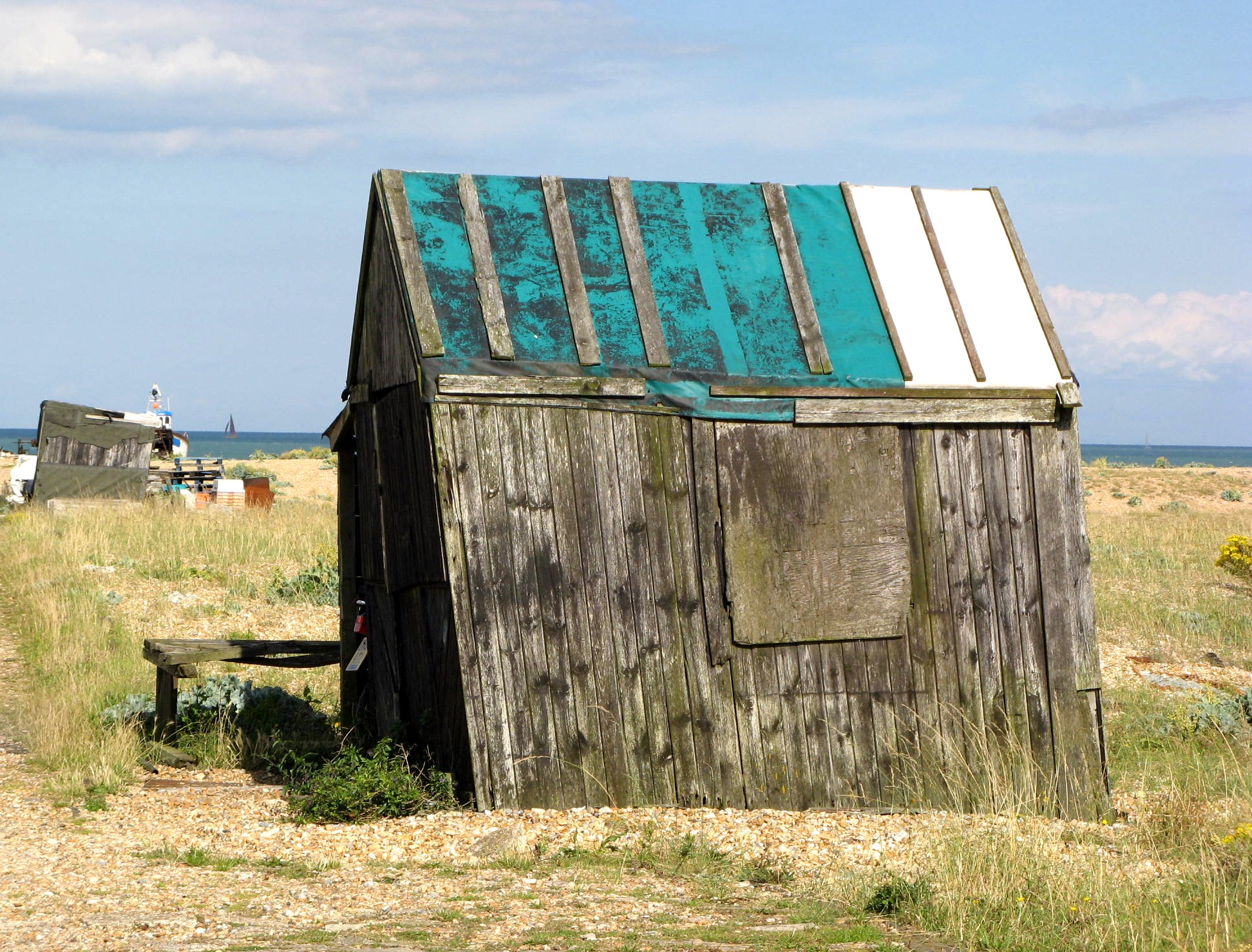 Dungeness UK